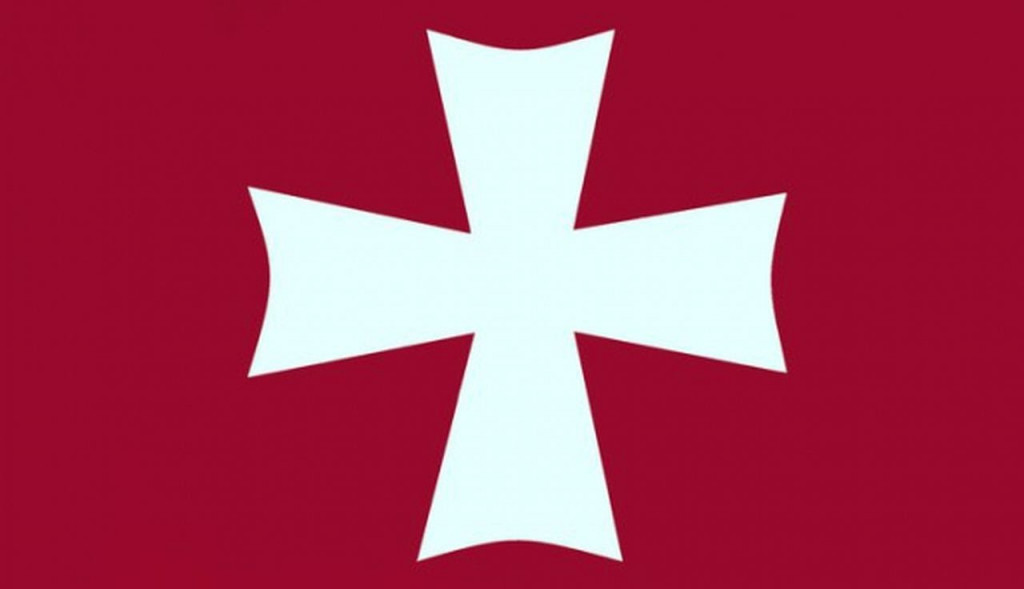 Bandera de las fiestas patronales de san juan de Ciudadela de Menorca